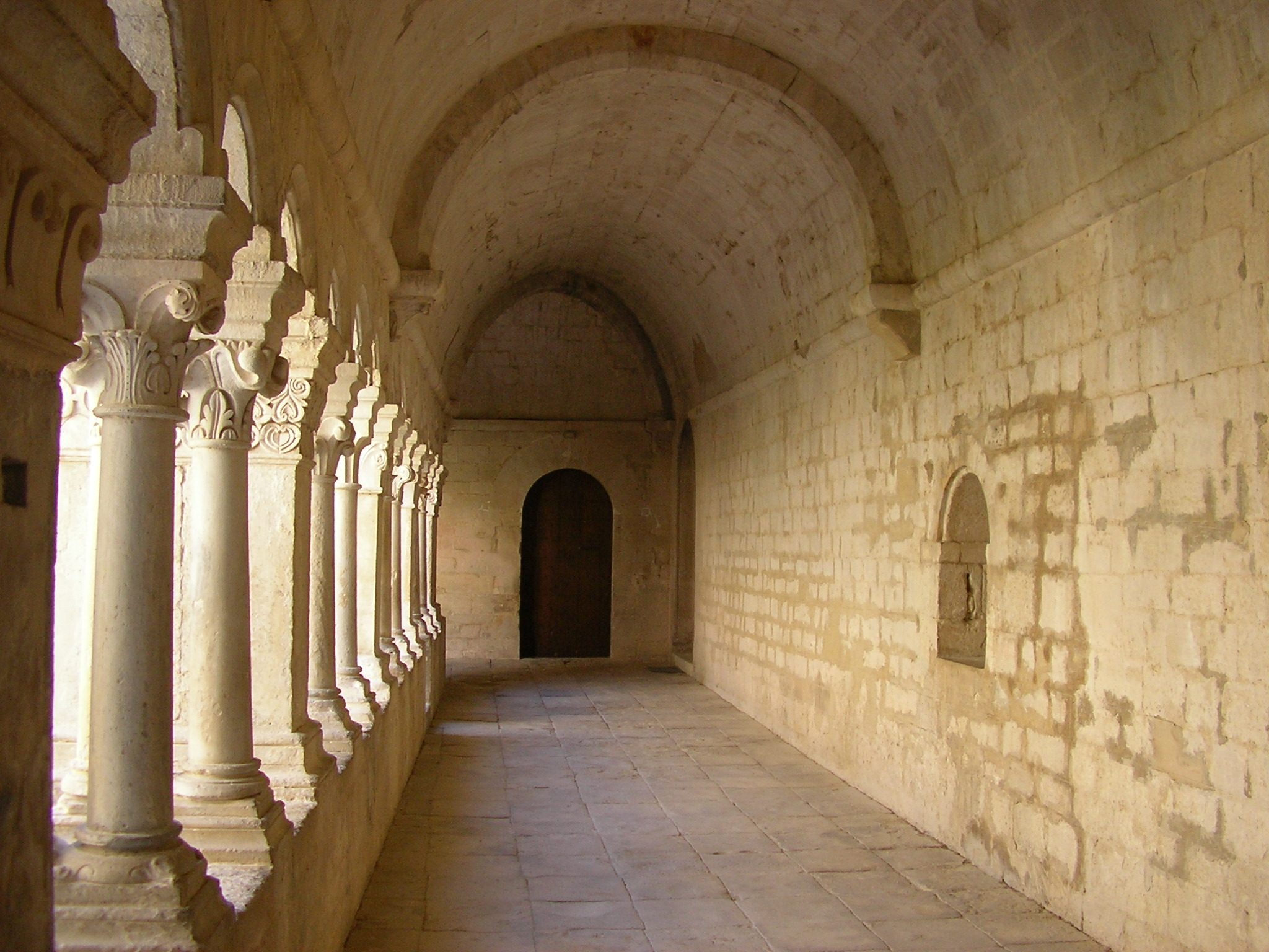 Il portico del Chiostro dell'Abbazia di Senanque